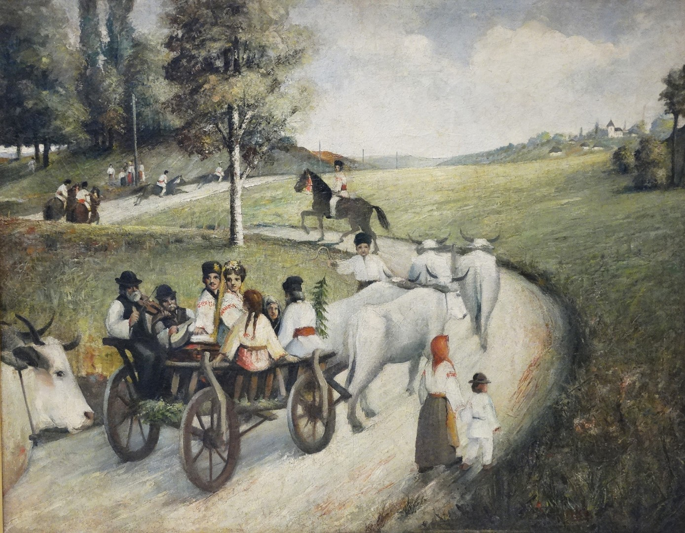 Nuntă transilvaneană, ulei pe pânză dublată, 108x138cm, semnat dreapta jos cu roșu, datat 1875, lucrare restaurată. "O mărturie a orientării sănătoase a lui Henția spre temele luate din viață a constituit-o, în vremea studiilor sale la Paris, și tabloul ce înfățișa o nuntă românească într-un sat transilvănean, operă de atelier, compusă însă desigur pe baza elementelor de observație directă acumulate anterior în țară", M. Popescu, "Sava Hentia", Espla 1954, pag.11